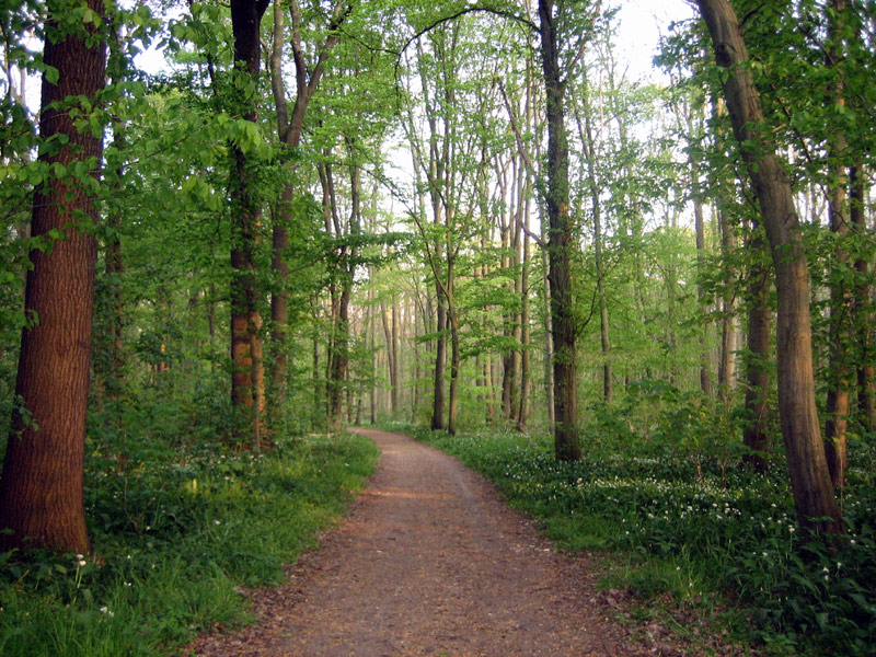 Leipziger Auwald 2007